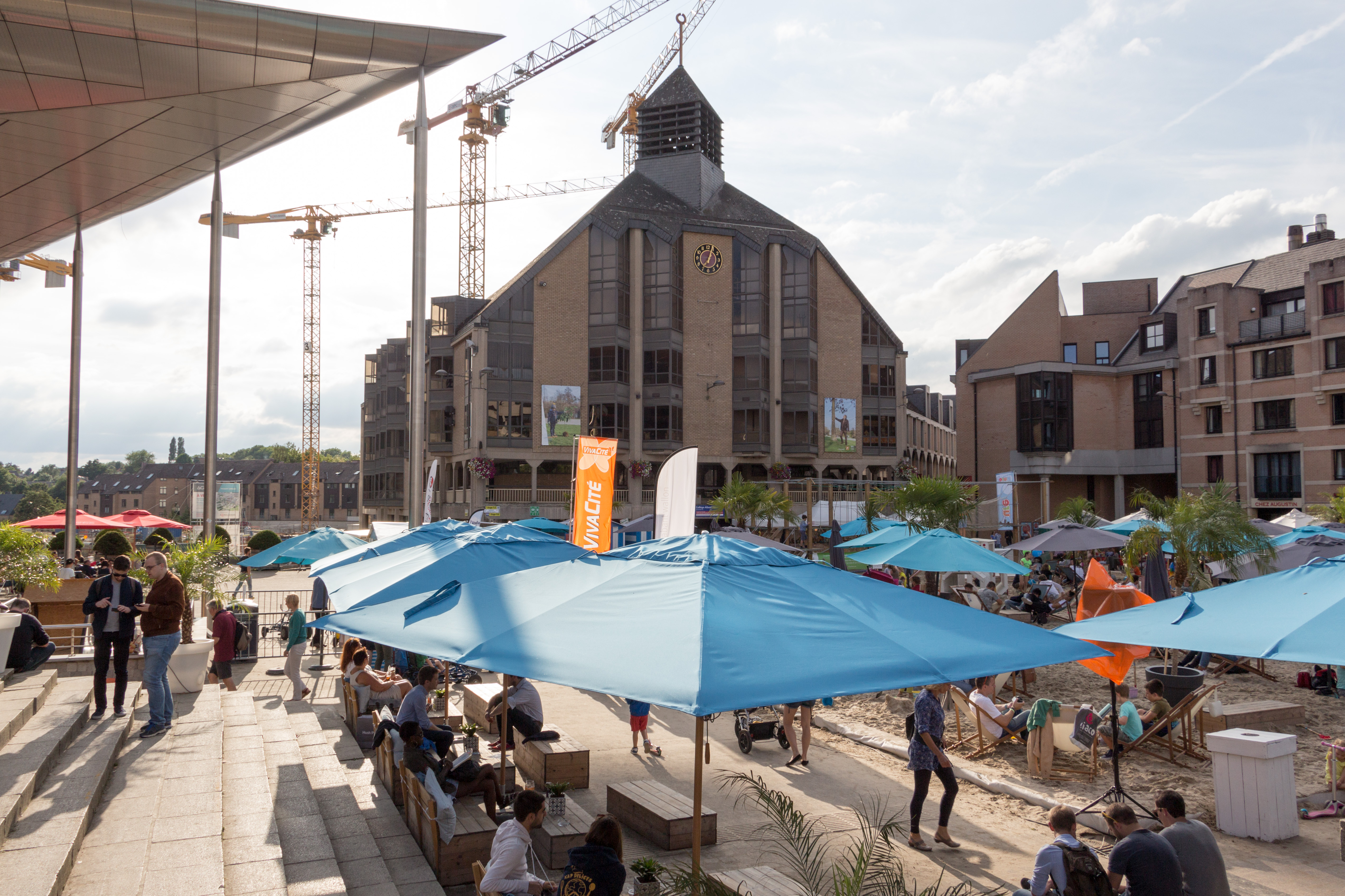 Grand Place de Louvain-la-Neuve en été lors de l'évènement "Louvain-la-Plage".